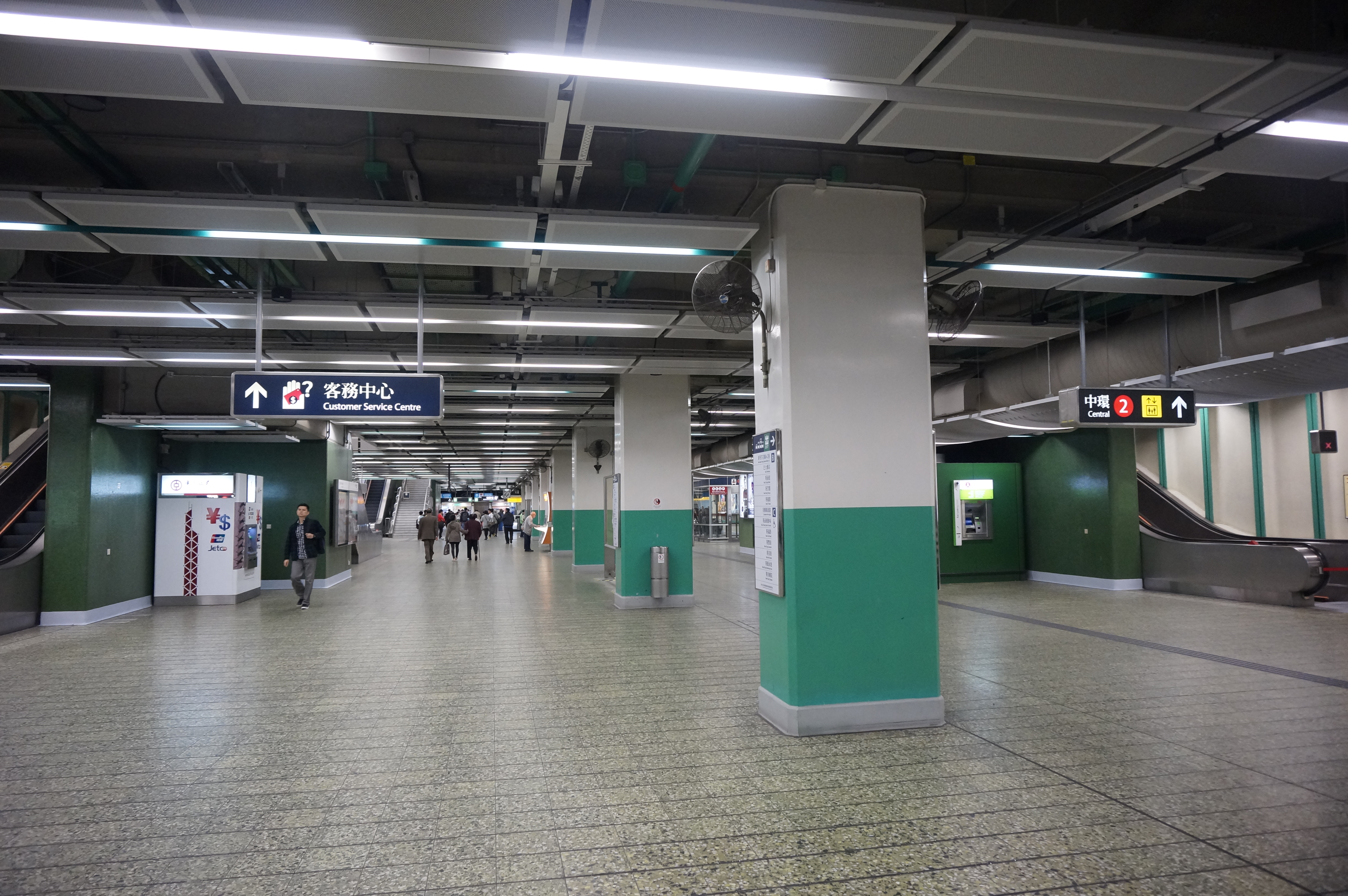 港鐵葵芳站大堂